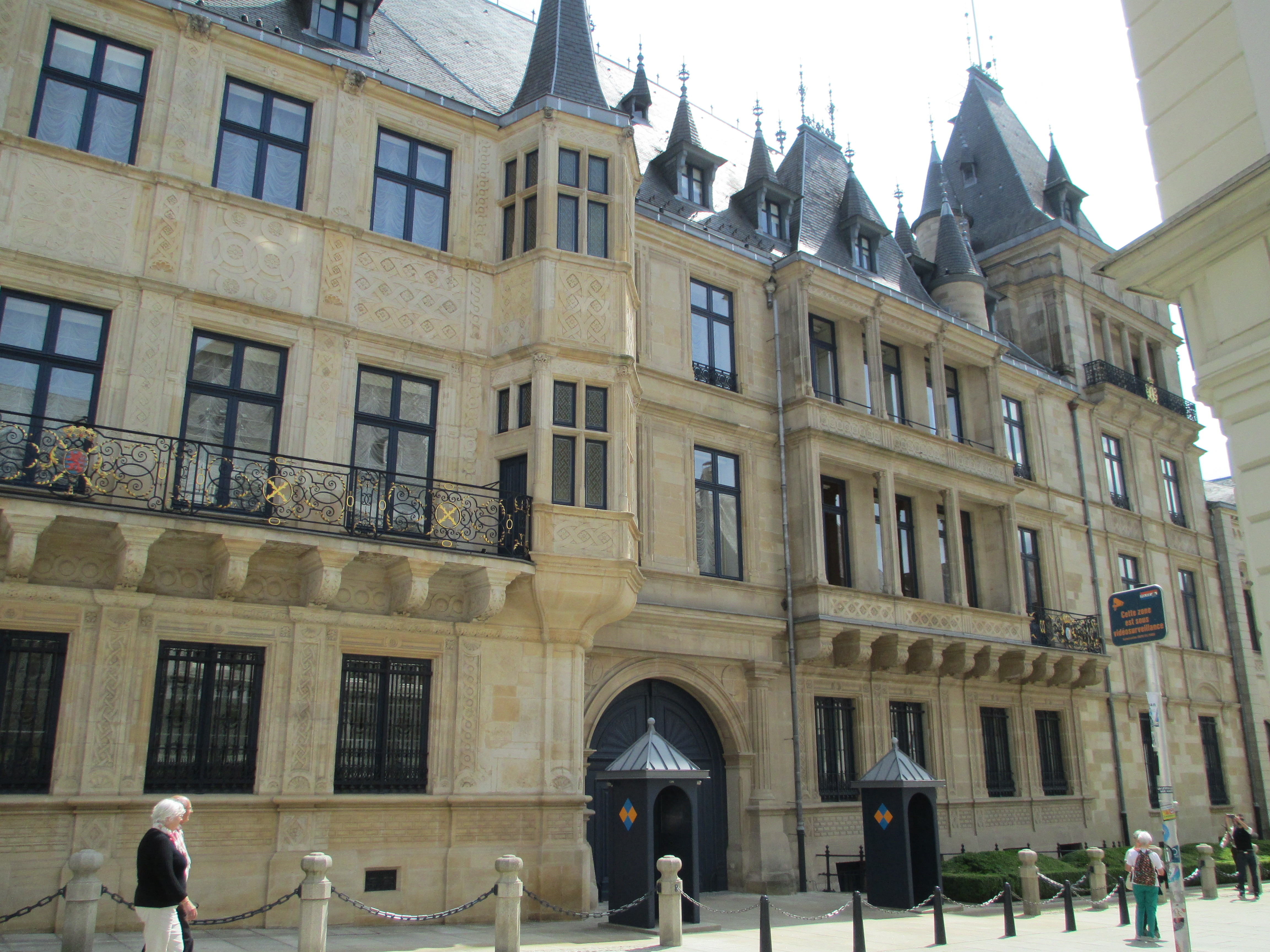 ארמון הדוכס הגדול בלוקסמבורג